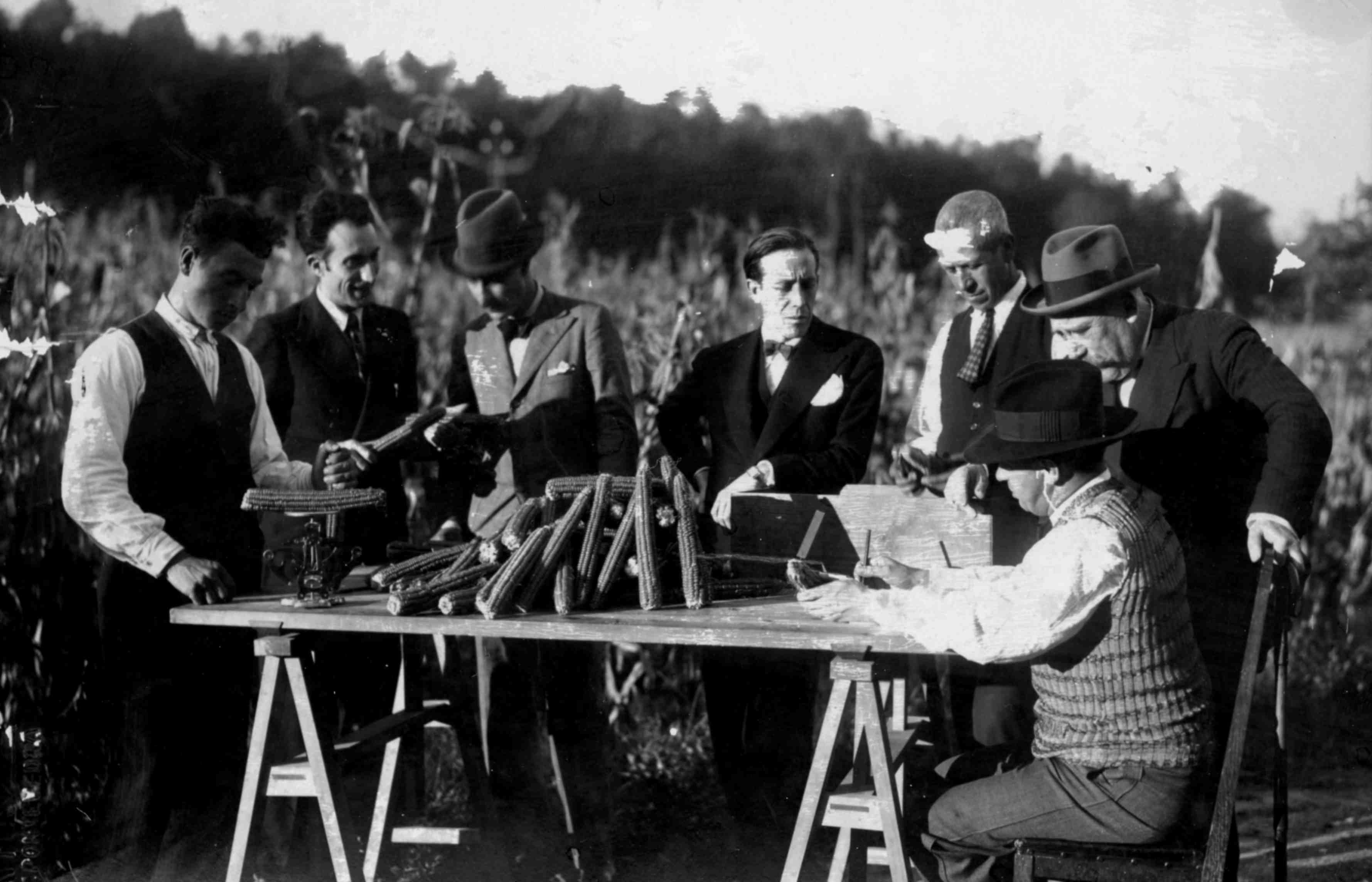 Galiziako Misio Biologikoan, datuak biltzen (1950 inguru)